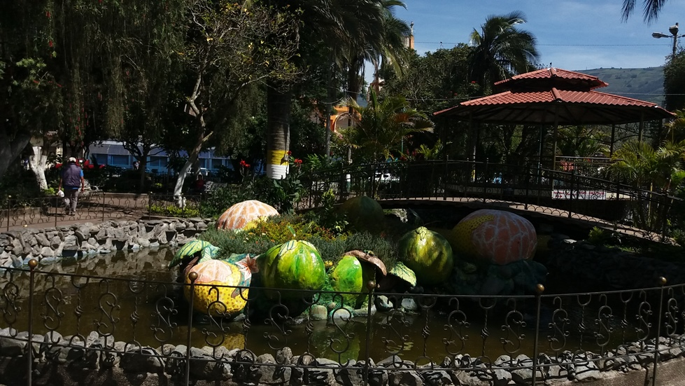 Parque Simón Bolívar, en el centro cantonal de Patate, provincia de Tungurahua.